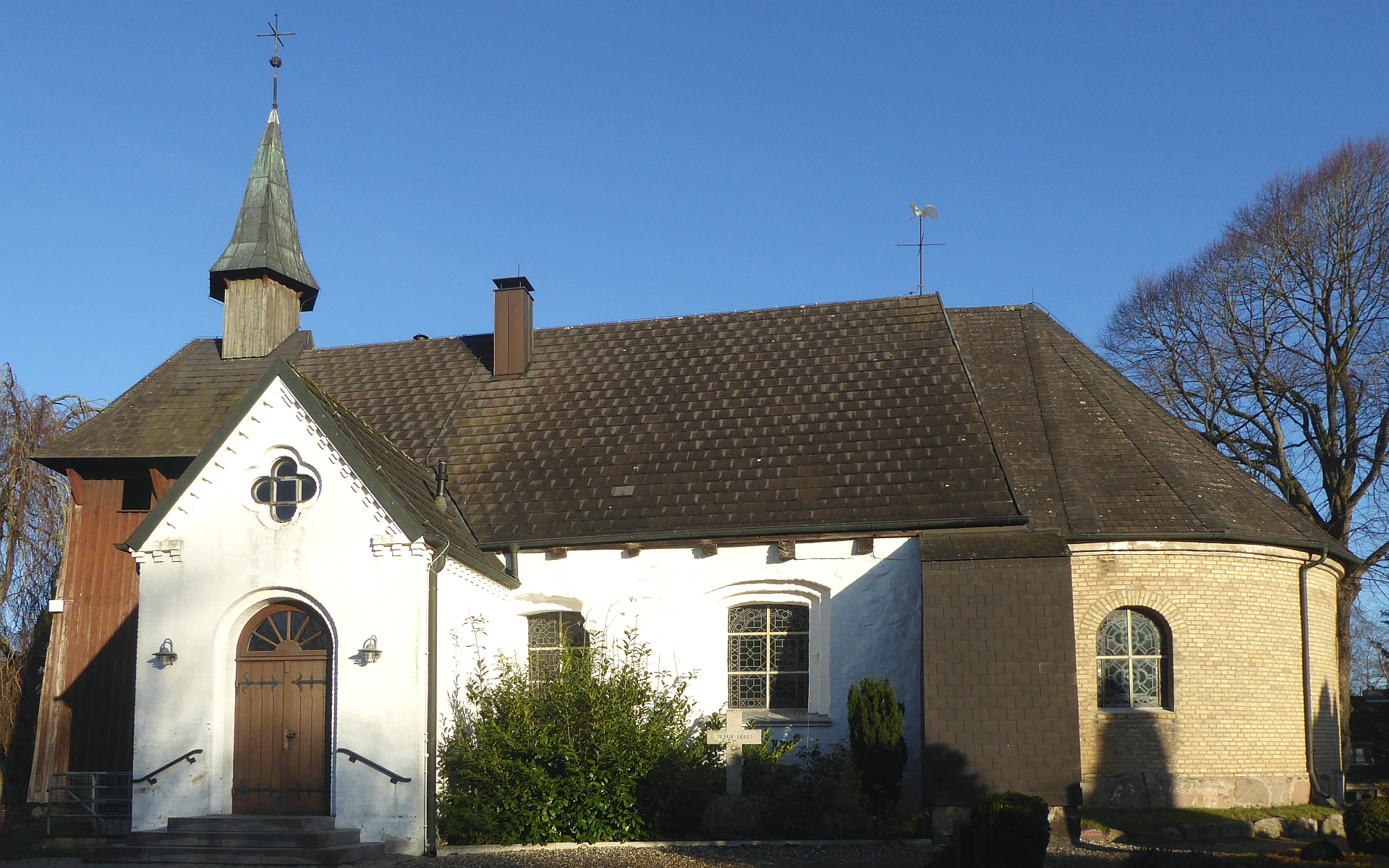 Loit romanische Feldsteinkirche mit Backsteinanbau 12 bis 19. Jahrhundert - Foto 2018 Wolfgang Pehlemann P1280450